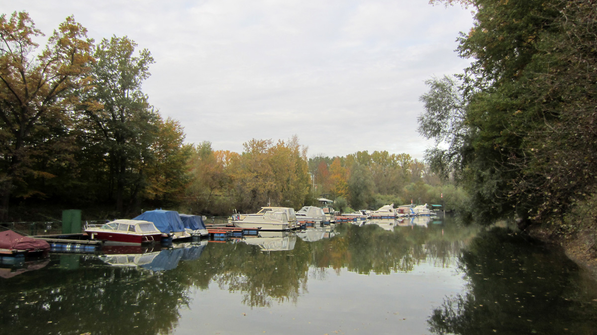 Yachthafen am Rhein bei Leimersheim